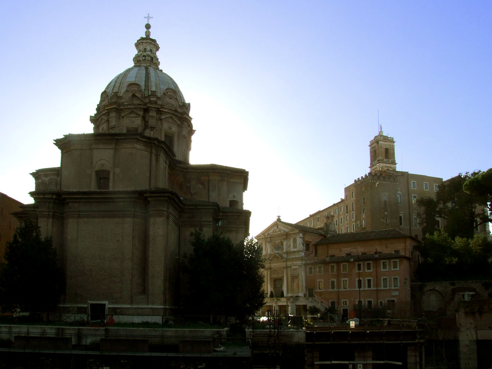 San Giuseppe dei Falegnami, Roma, tra SS. Luca e Martina e Palazzo Senatorio